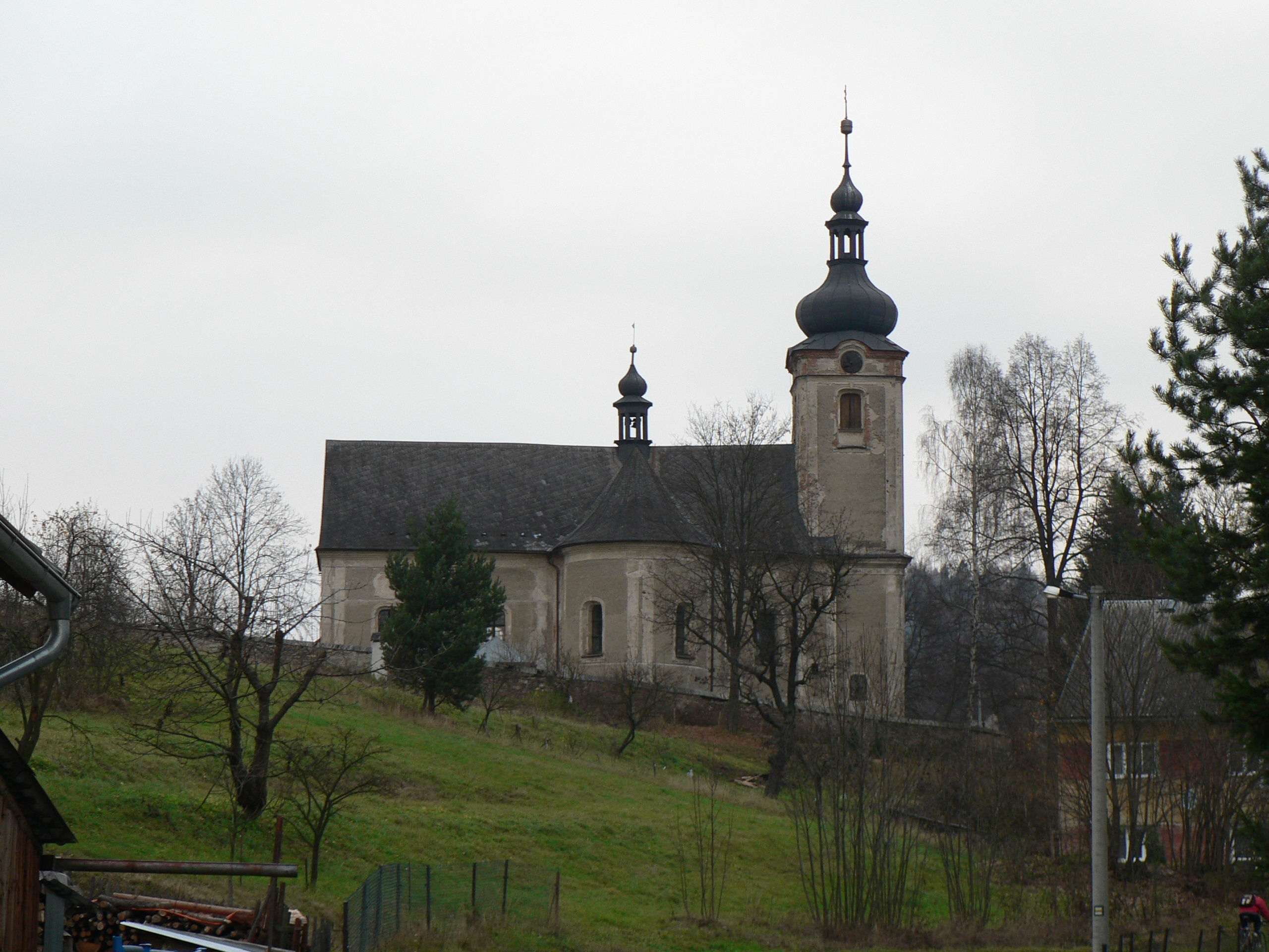 Kostel svatého Michala (Rejchartice)